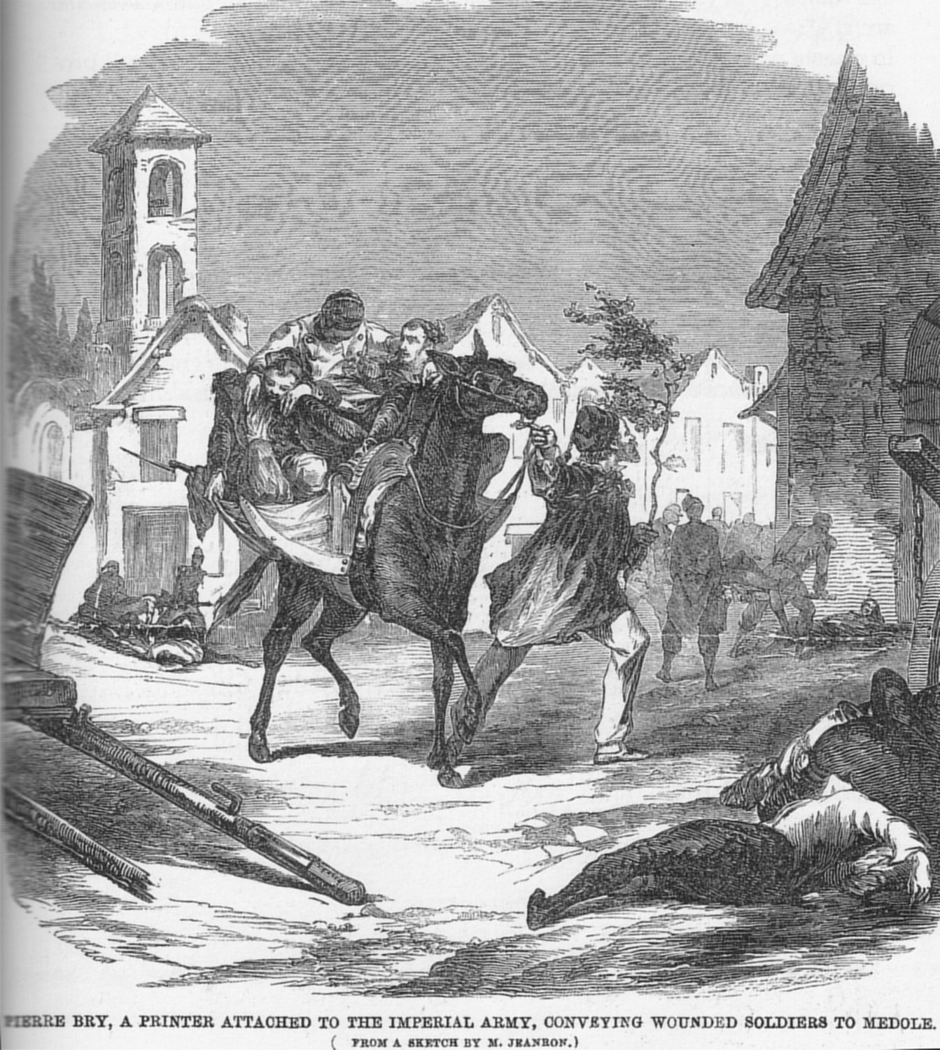 24 giugno 1859, ore 6,00 a.m. - Dopo la conquista di Medole da parte delle truppe francesi del generale Niel, si portano i feriti all'ambulanza di palazzo Ceni.